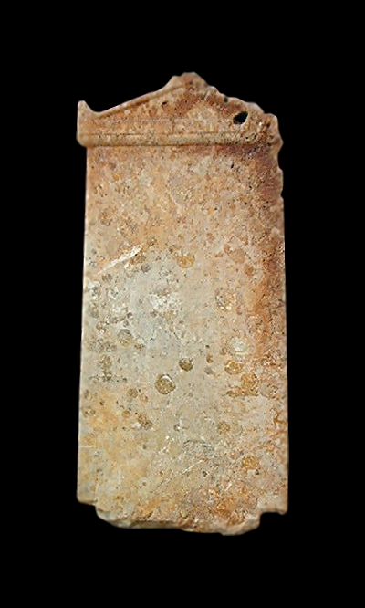 Stèle grecque au musée du Bardo, fouilles de Mahdia